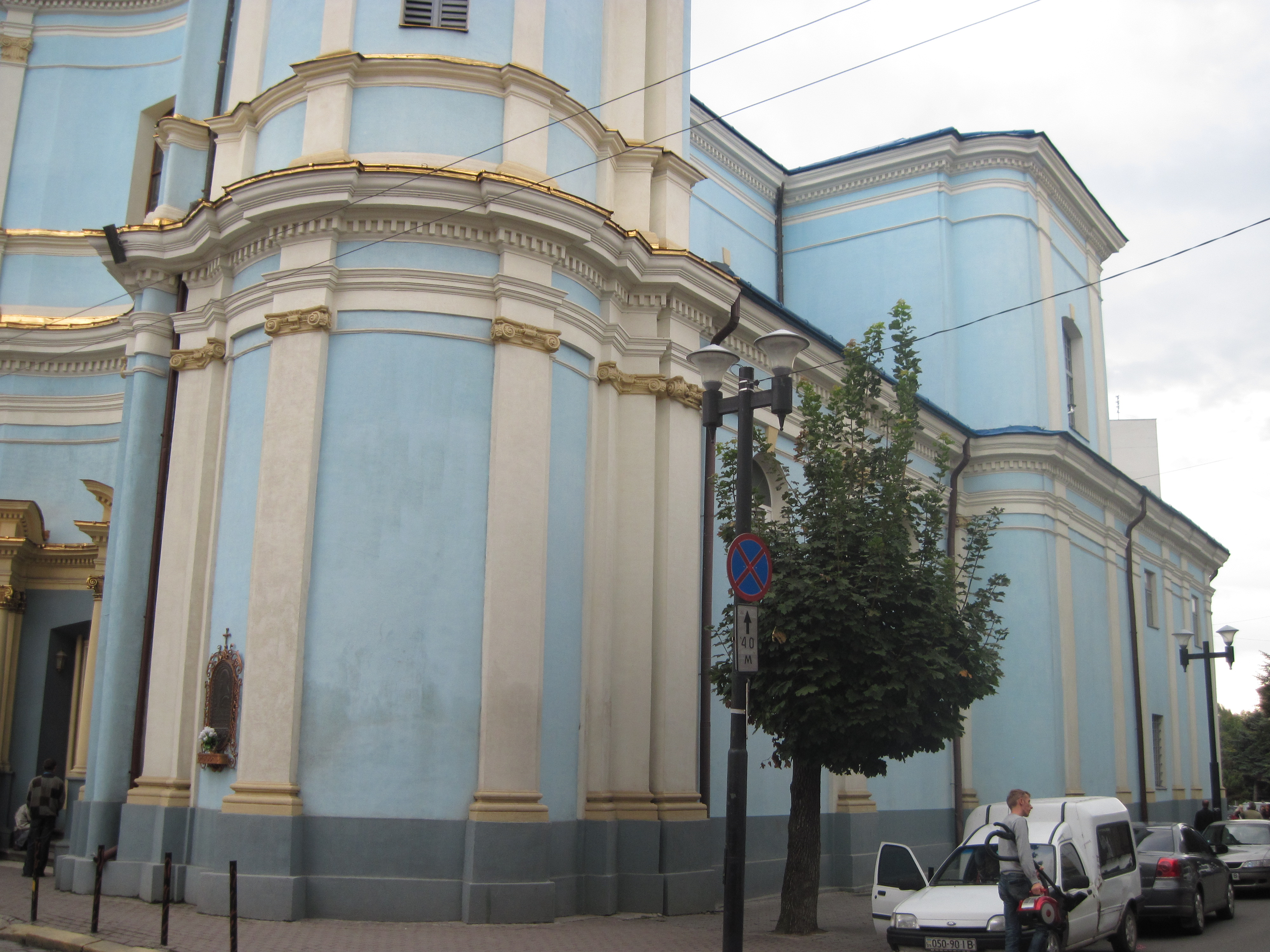 Колишня Вірменська церква. Станиславів